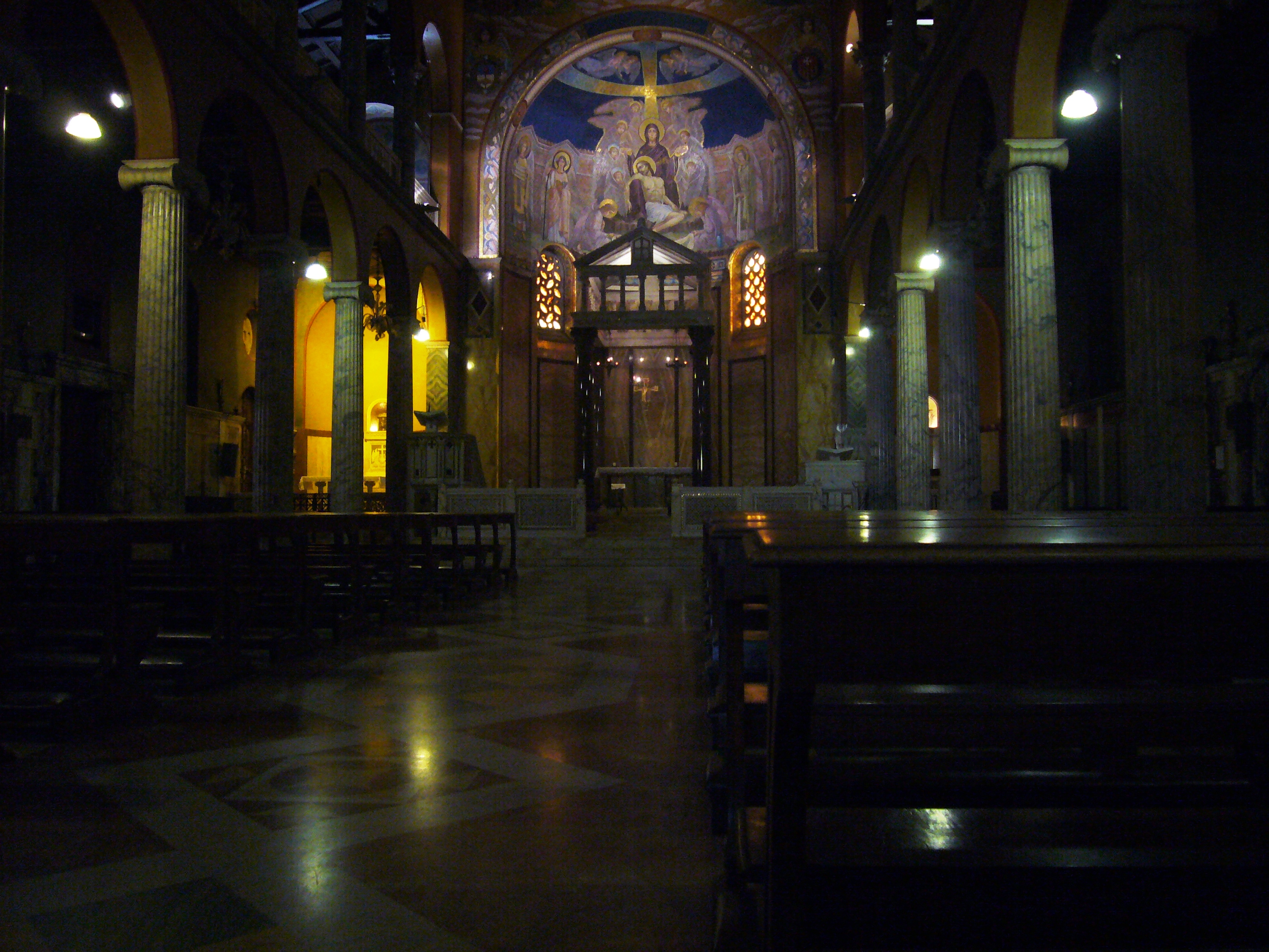 Roma, S. Maria Addolorata a piazza Buenos Aires: interno